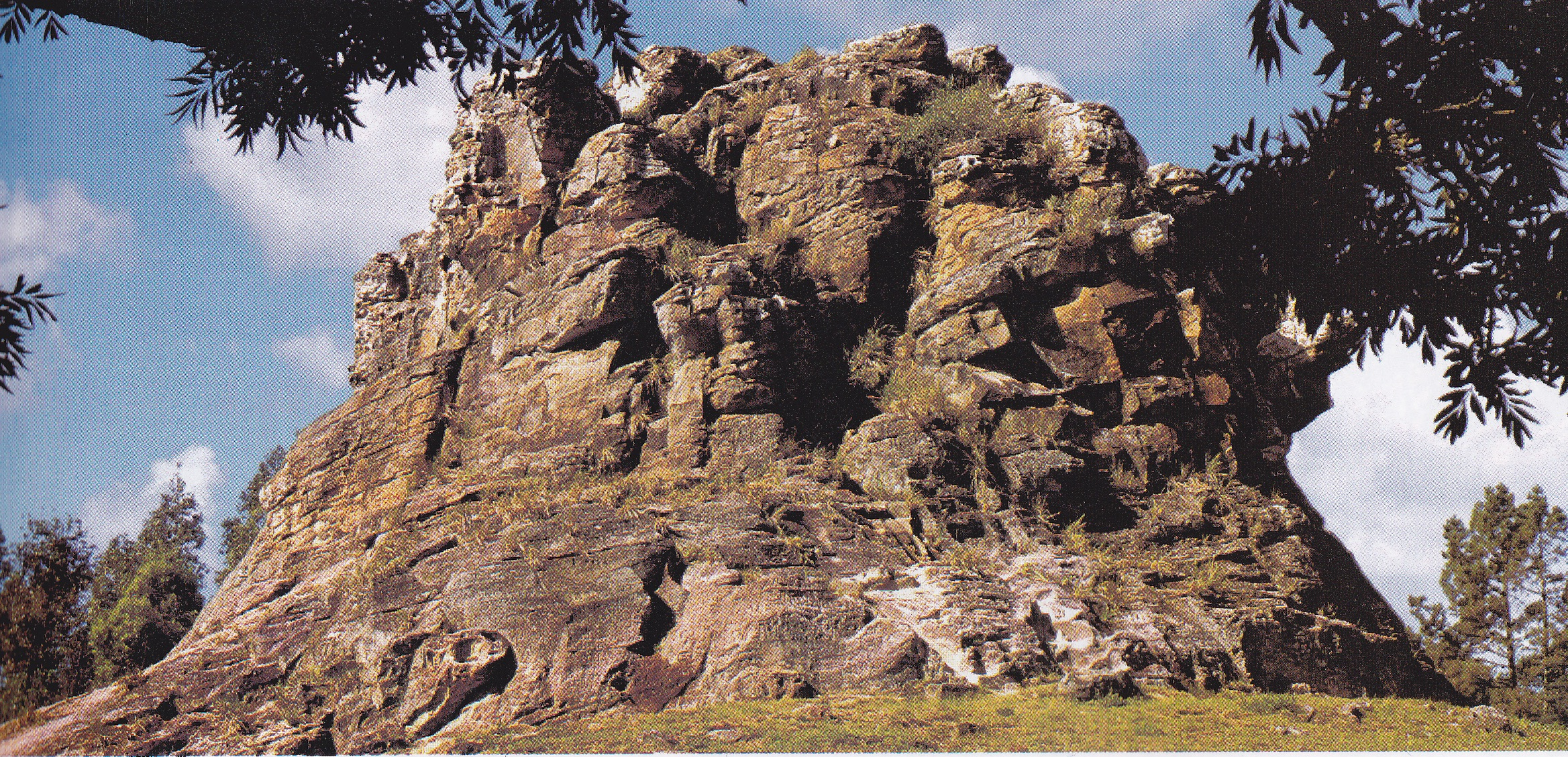 Piedra Pintada